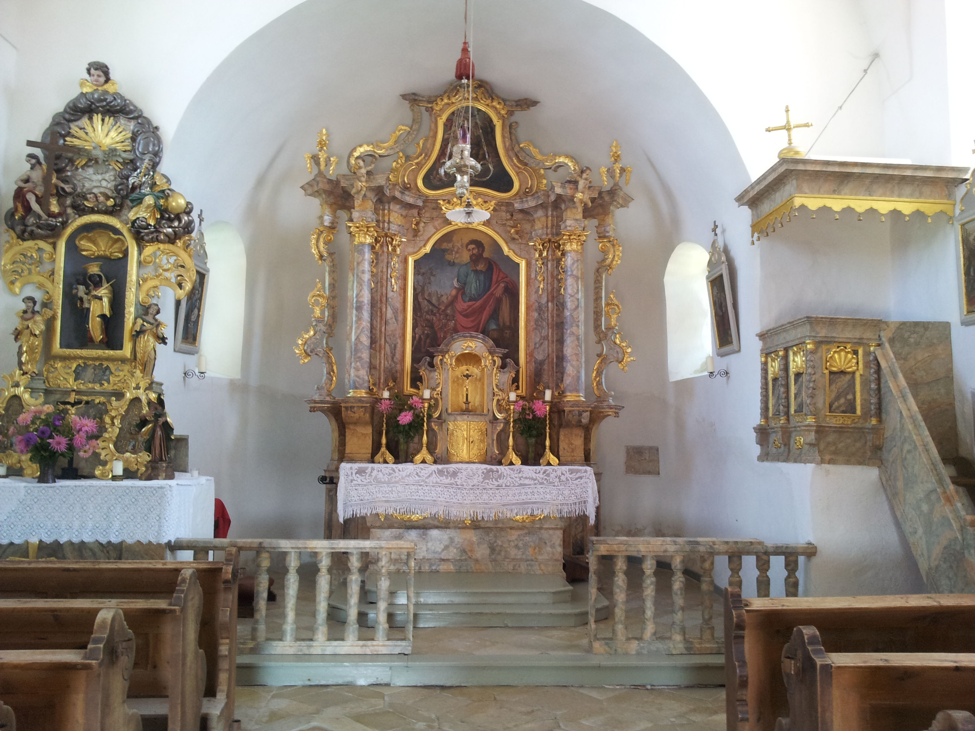 Blick auf den Altarraum